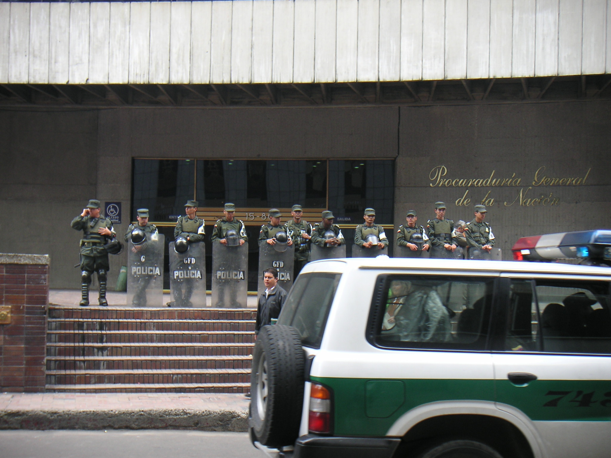 Description: Procaduradía General, Bogotá, Colombia Source: Louise Wolff (darina), May 2005